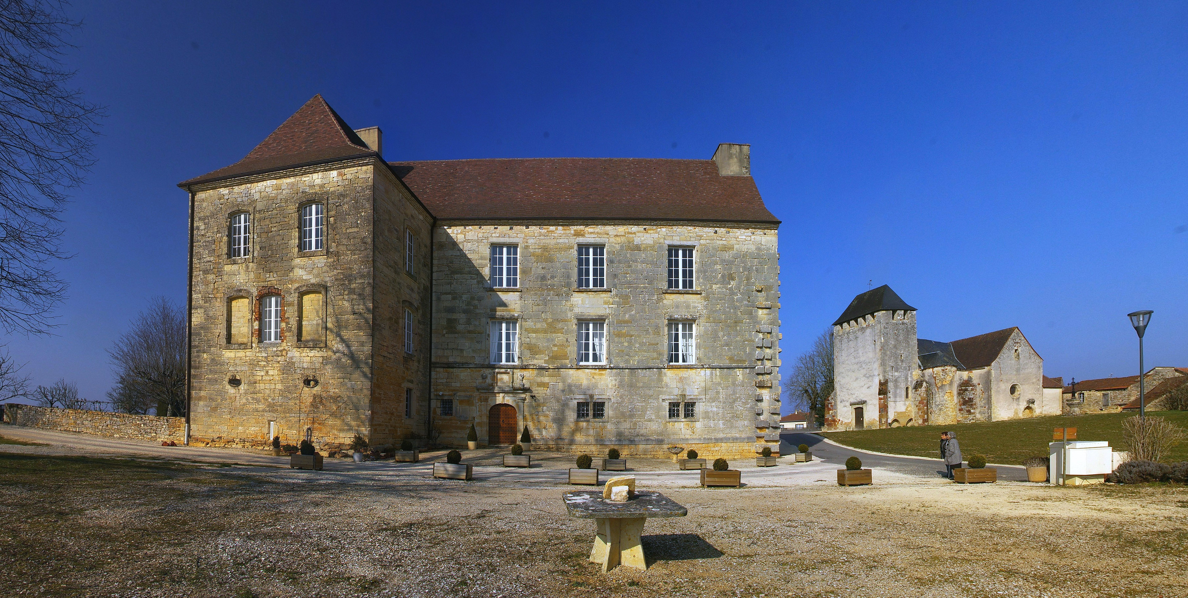 Château de Lavercantière